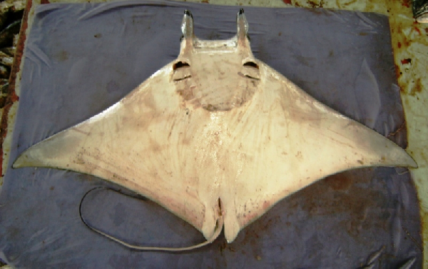 Скат рода мобул